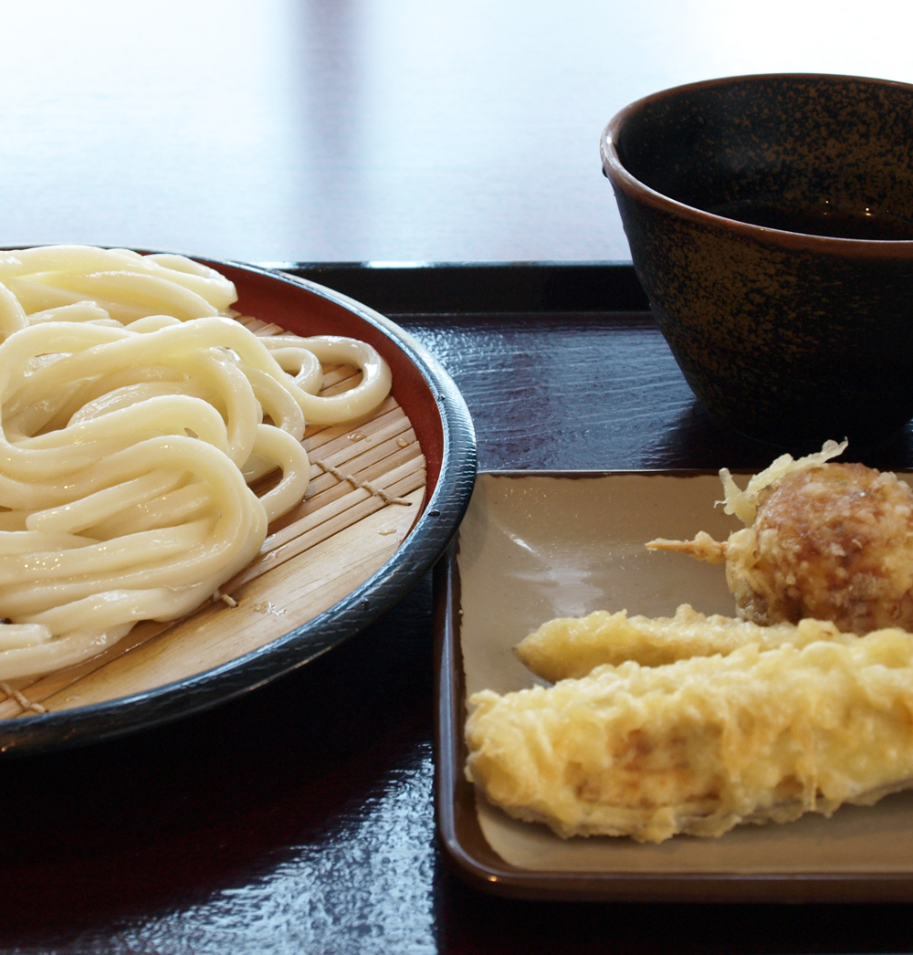 ざるうどん、たこ焼きとなすの天ぷら